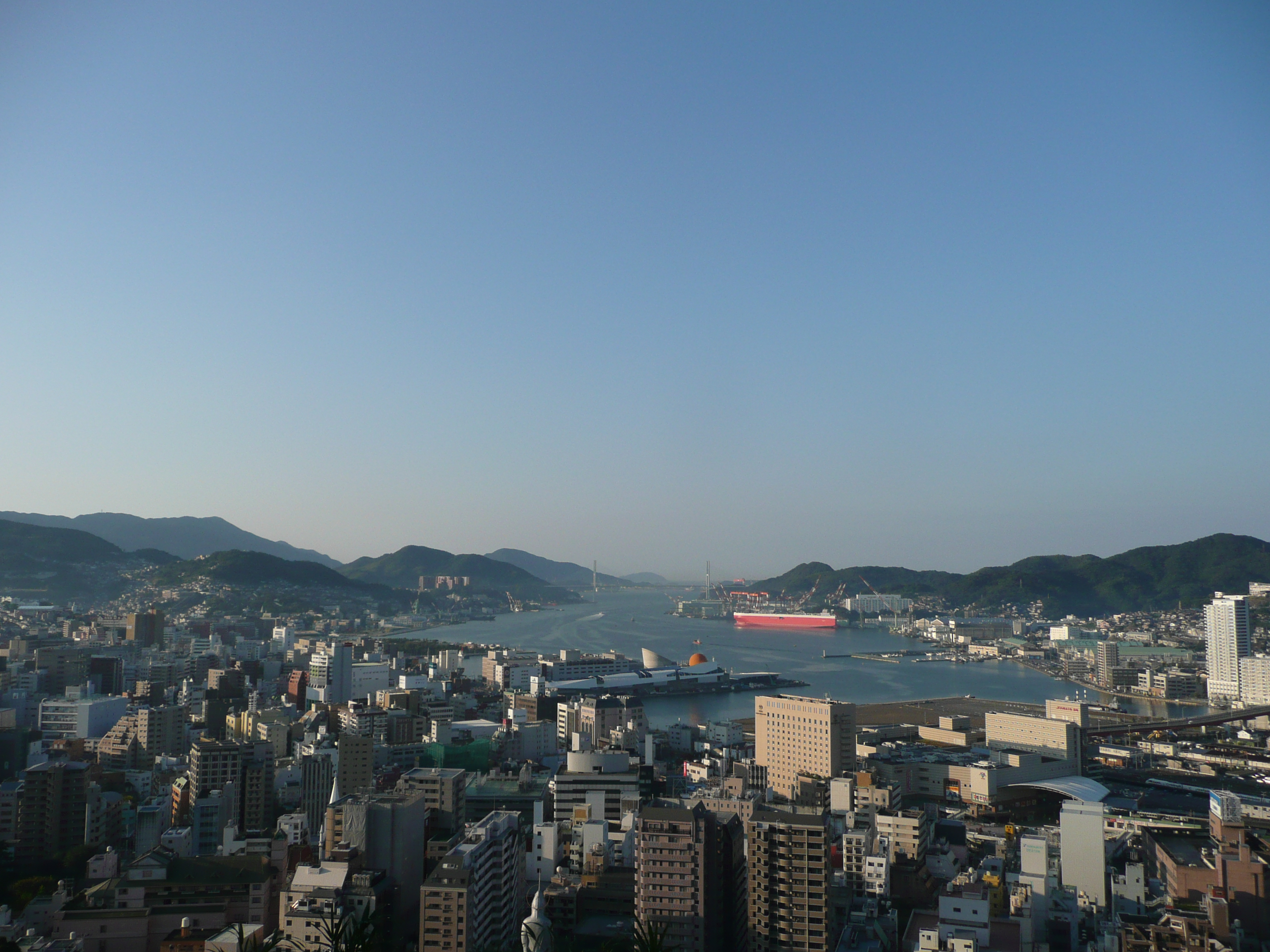 高台より長崎港内を望む